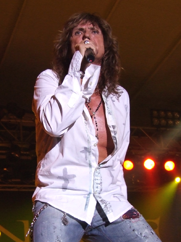 Whitesnake. Lorca Rock Festival (Lorca, Murcia), 18/06/2006